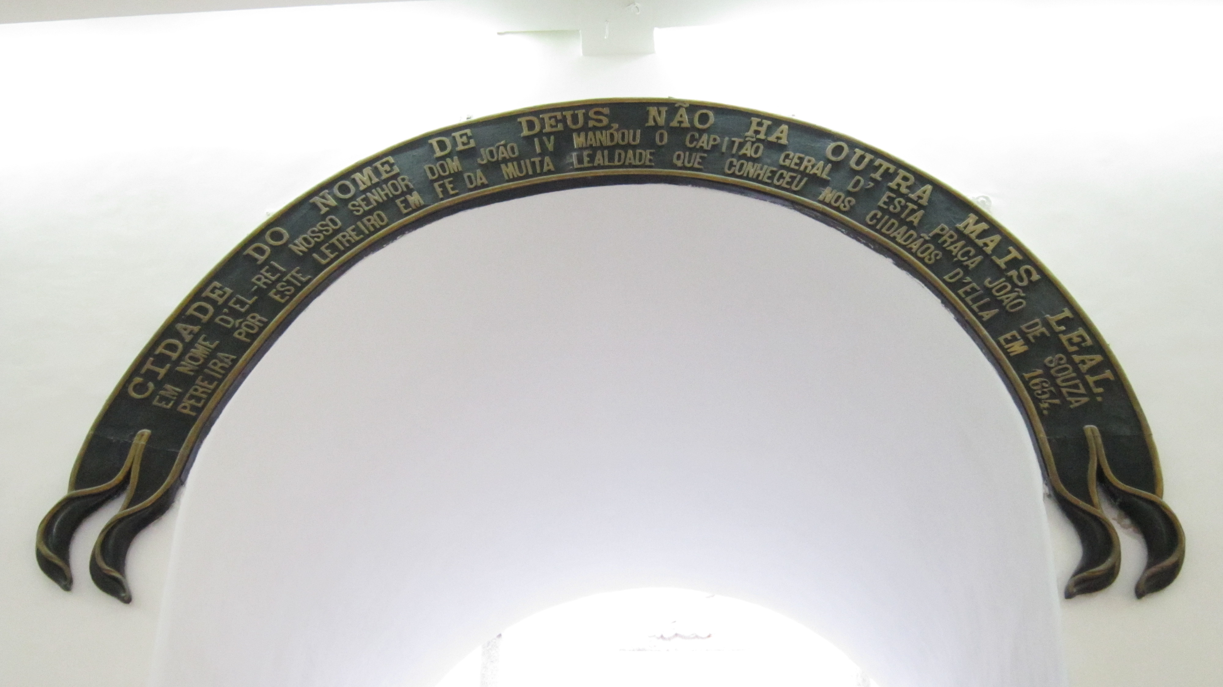 Macau, a cidade do Nome de Deus, não ha outra mais leal